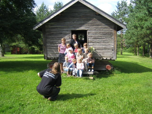 kirkkoaitta